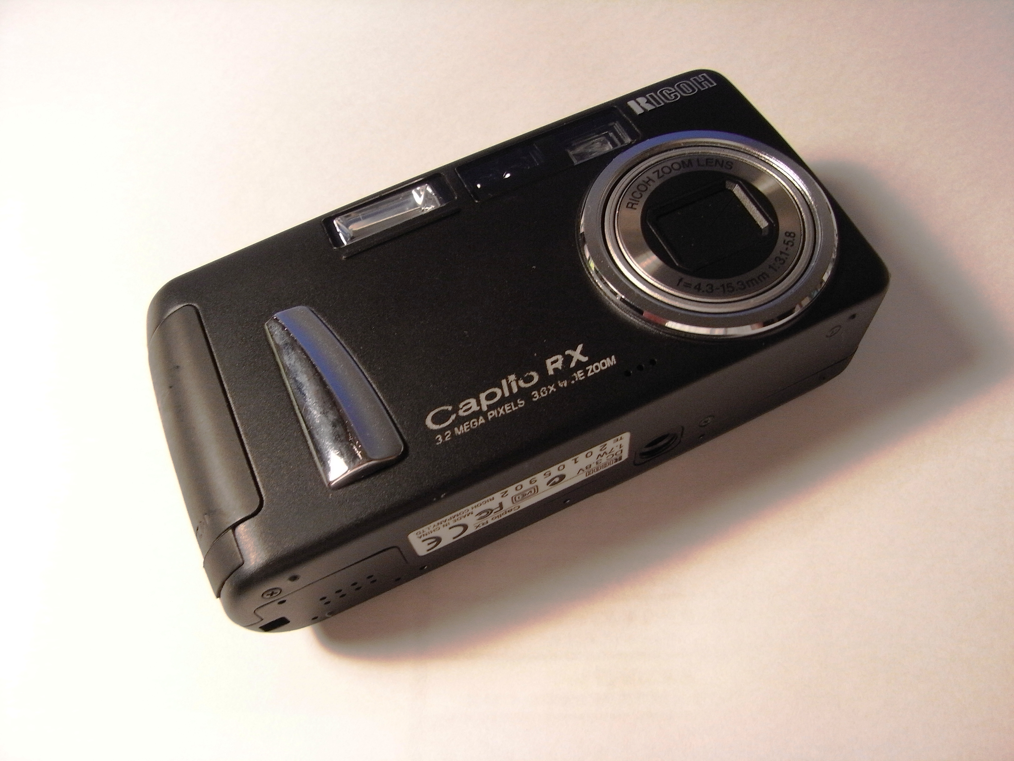 Digital camera Ricoh Caplio RX